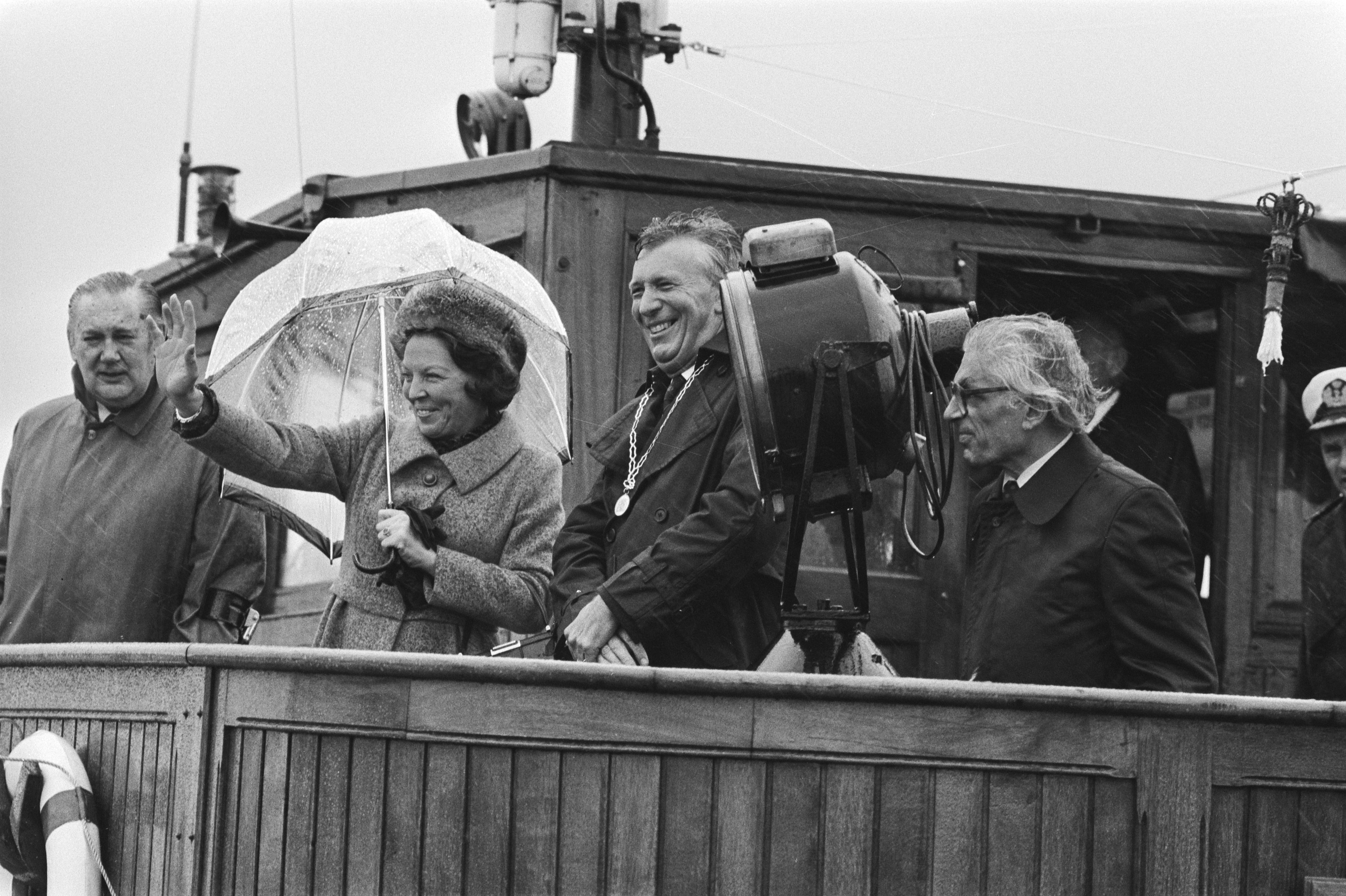 Verbrede en gemoderniseerde Amsterdam-Rijnkanaal door koningin Beatrix officiëel in gebruik genomen. Van links naar rechts minister Zeevalking (D66, Verkeer en Waterstaat), Koningin Beatrix, J.J.H. Pop (burgemeester Tiel) (volgens dezelfde bron: de burgemeester van de gemeente Maurik: Dick Chr. Hoek) en Wim Polak (PvdA, burgemeester Amsterdam) tijdens de opening van de keersluis. (Ravenswaaij, Gelderland)